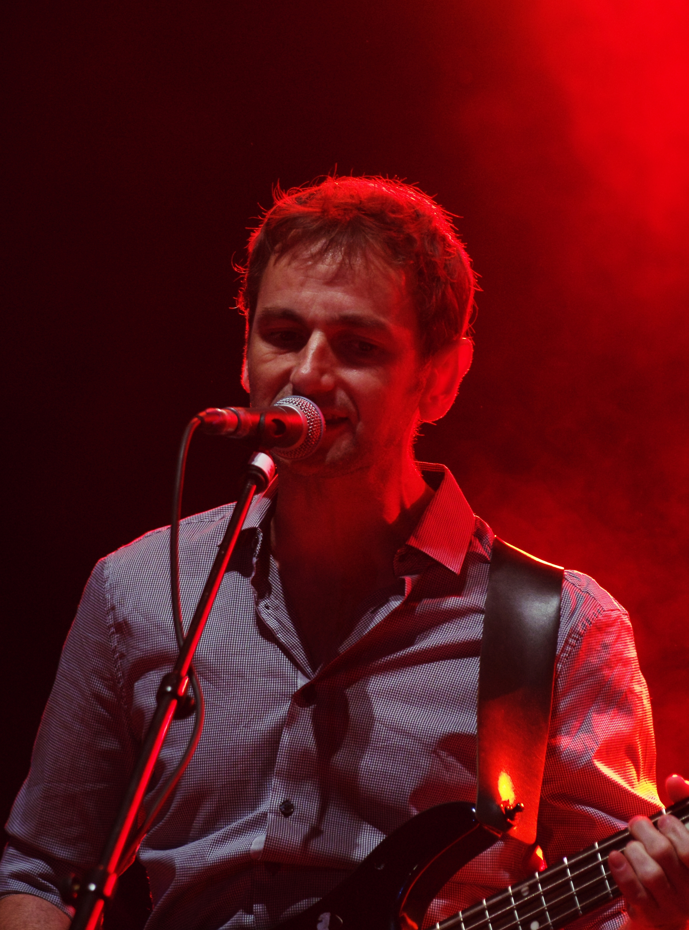 James (band) auf dem Haldern Pop Festival 2013. Hauptbühne. Besetzung: Tim Booth (Gesang) Jim Glennie (Bass) Larry Gott (Gitarre) Saul Davies (Gitarre, Violine, Percussion) Mark Hunter (Keyboards) Dave Baynton-Power (Schlagzeug) Andy Diagram (Trompete, Percussion)